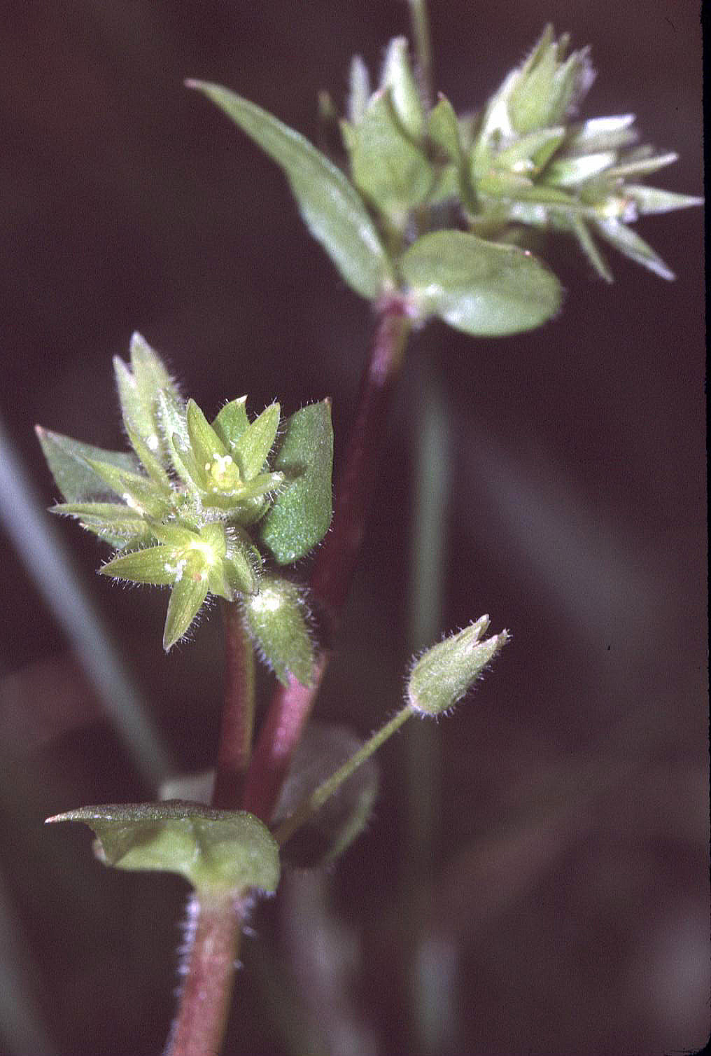 Stellaria pallida, eigenes Foto von 1990, Unterfranken, Benutzer:Fornax, Lizenz: Bild-PD